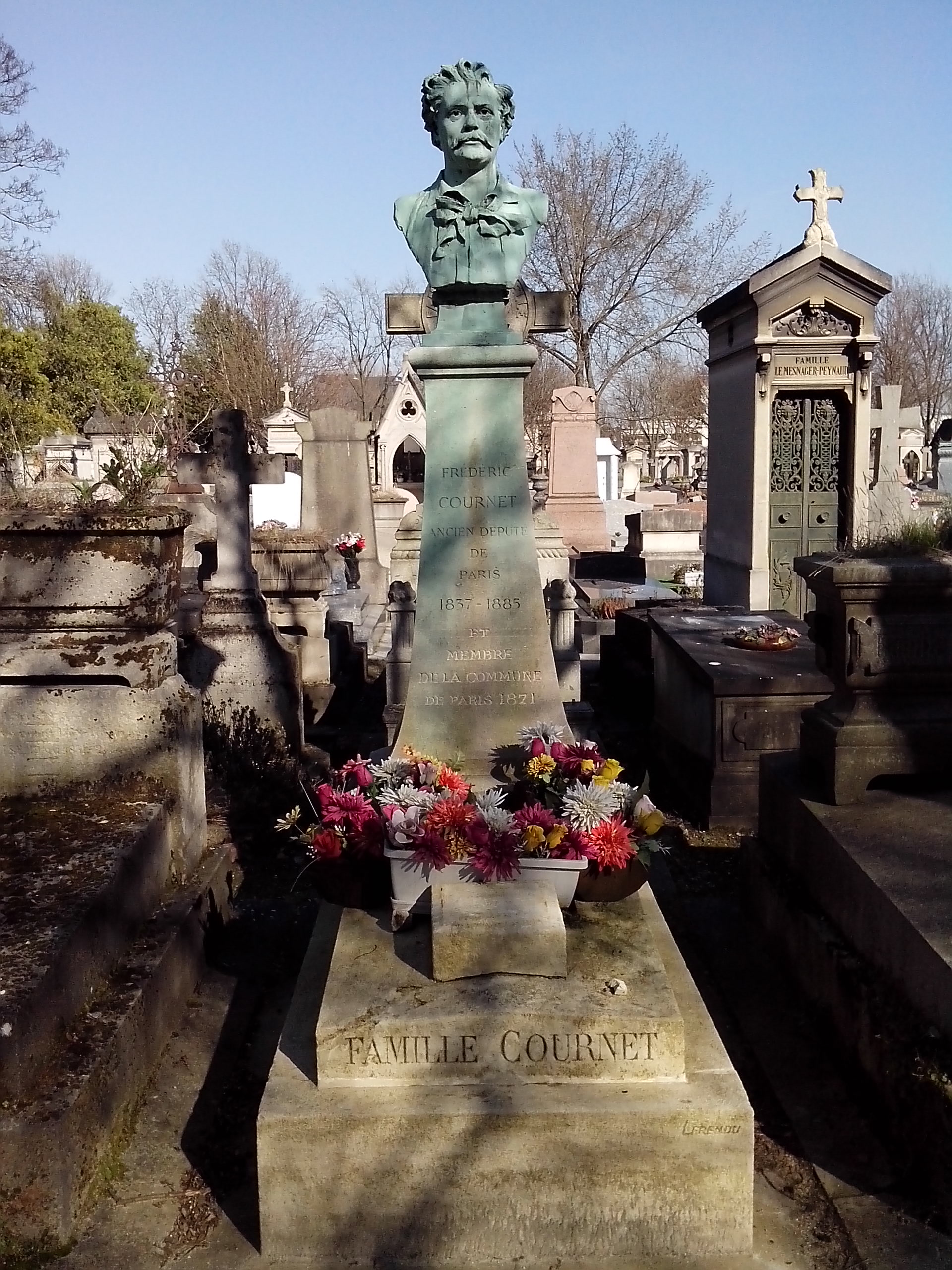 Sépulture de Frédéric Cournet (1837-1885), personnalité de la Commune de Paris. Stèle ornée d'un médaillon en bronze signé , 1886. Le préfet de la Seine refusa d'apposer sur la pierre tombale une plaque contenant l'inscription « Ancien député, ancien membre de la Commune ». Le Conseil municipal vota une délibération obligeant l'administration à accepter cette inscription. Concession perpétuelle gratuite par délibération du Conseil municipal de Paris en date du 17 décembre 1885.